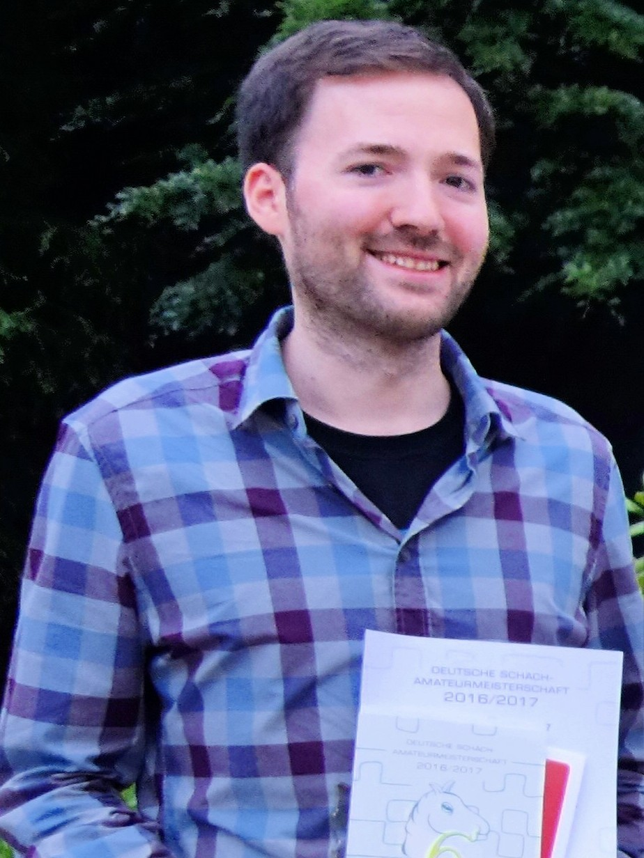 Derek Gaede, Dähne-Pokal-Sieger 2017 in Niedernhausen.